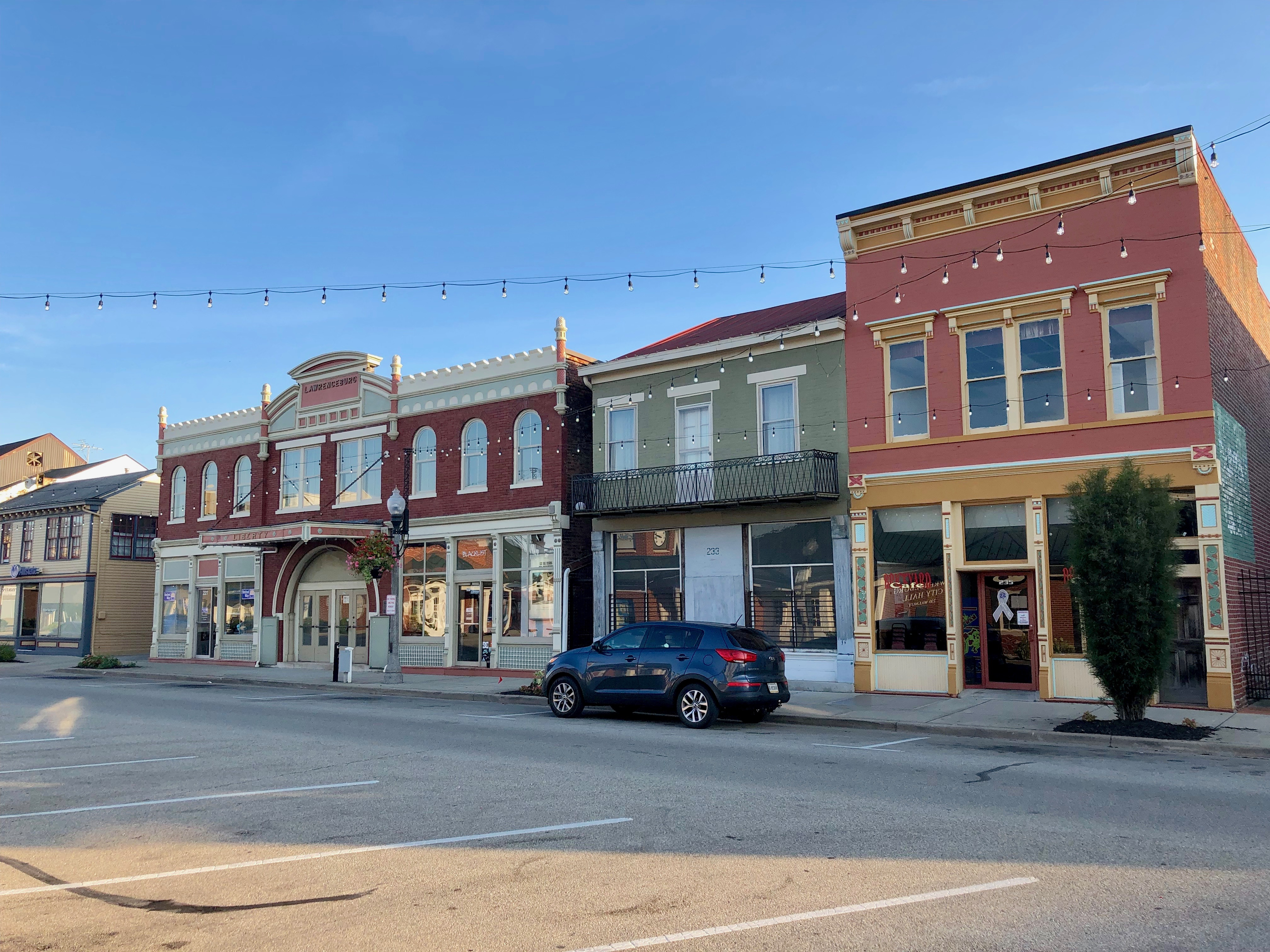 Walnut Street, Lawrenceburg, IN